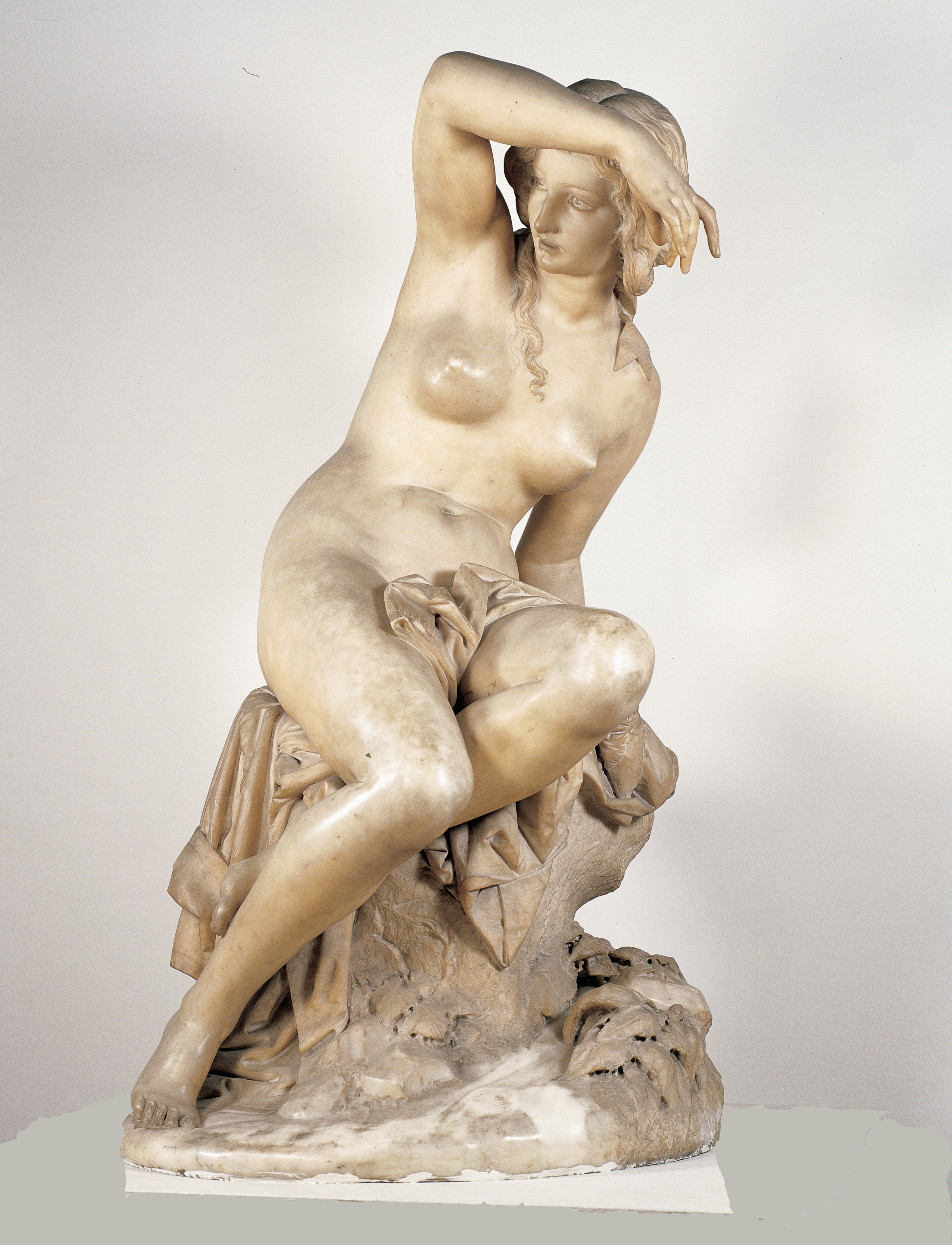 Carlo Antonio Tantardini, Bagnante seduta (Bañista sentada). Ca. 1861. 130 x 68 x 66 cm, esculpido en mármol. Inv. 3641.